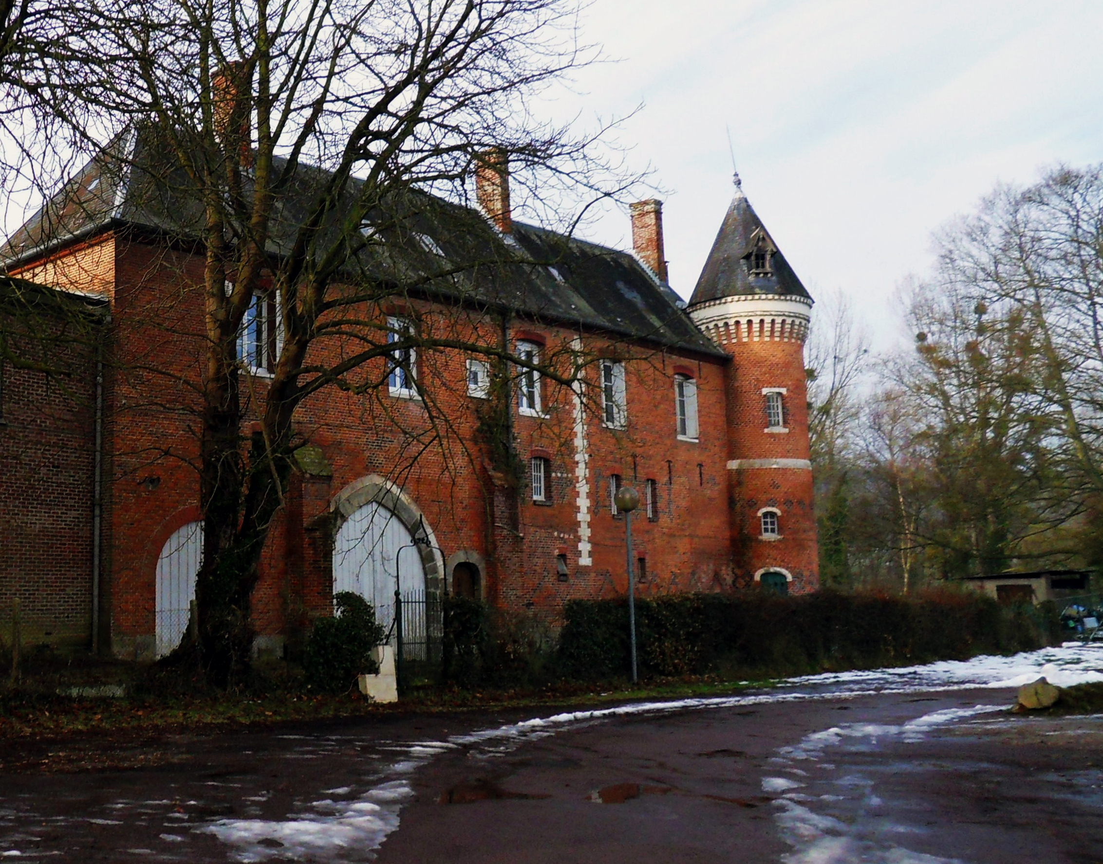 Rieux (Seine-Maritime, France) - Le manoir. .